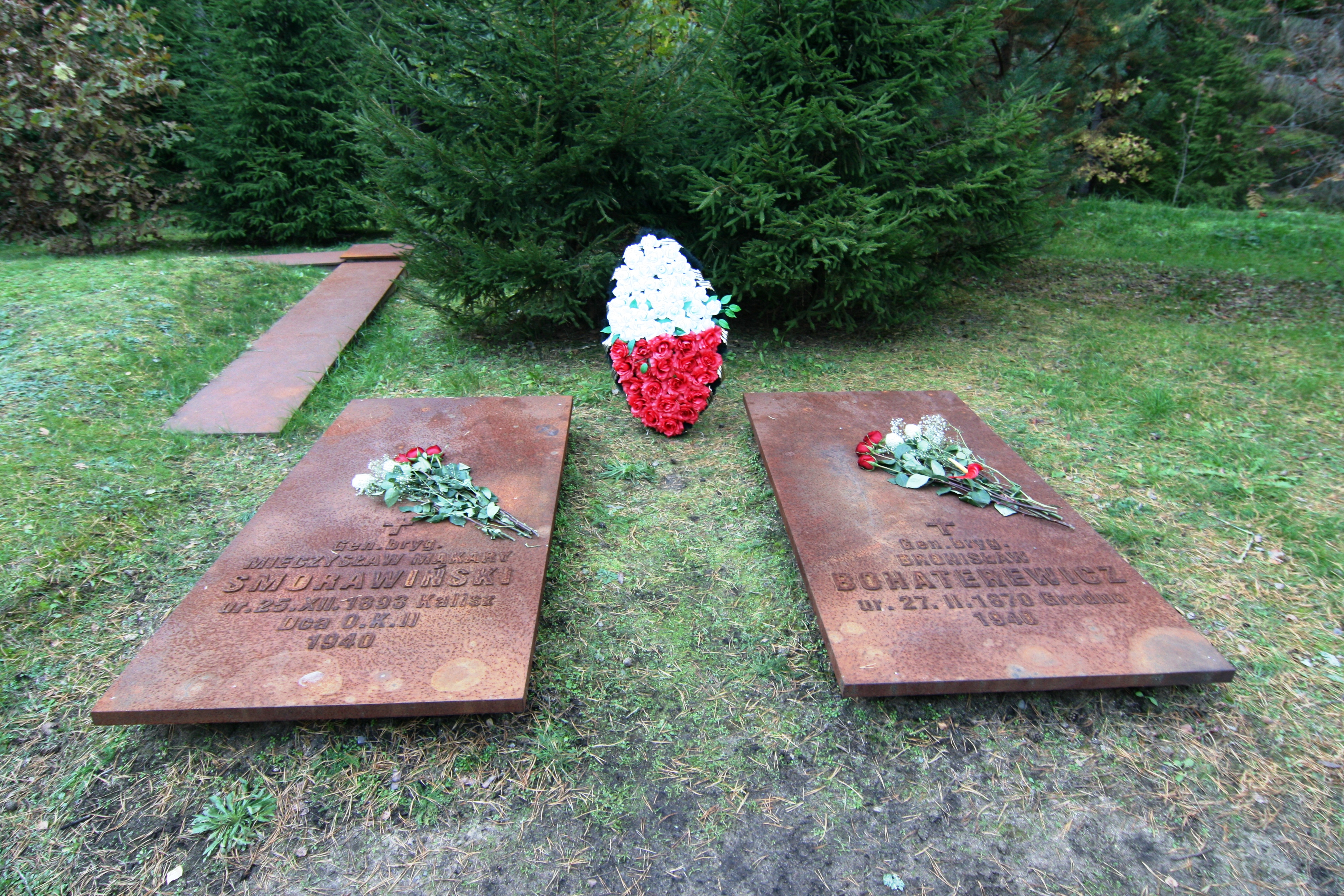 Groby generałów Smorawińskiego i Bohatyrewicza w Katyniu